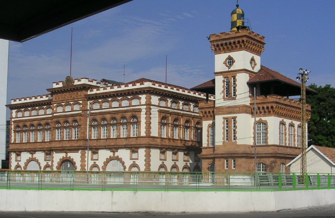 Die Alfandega (das Zollhaus) am Hafen von Manaus